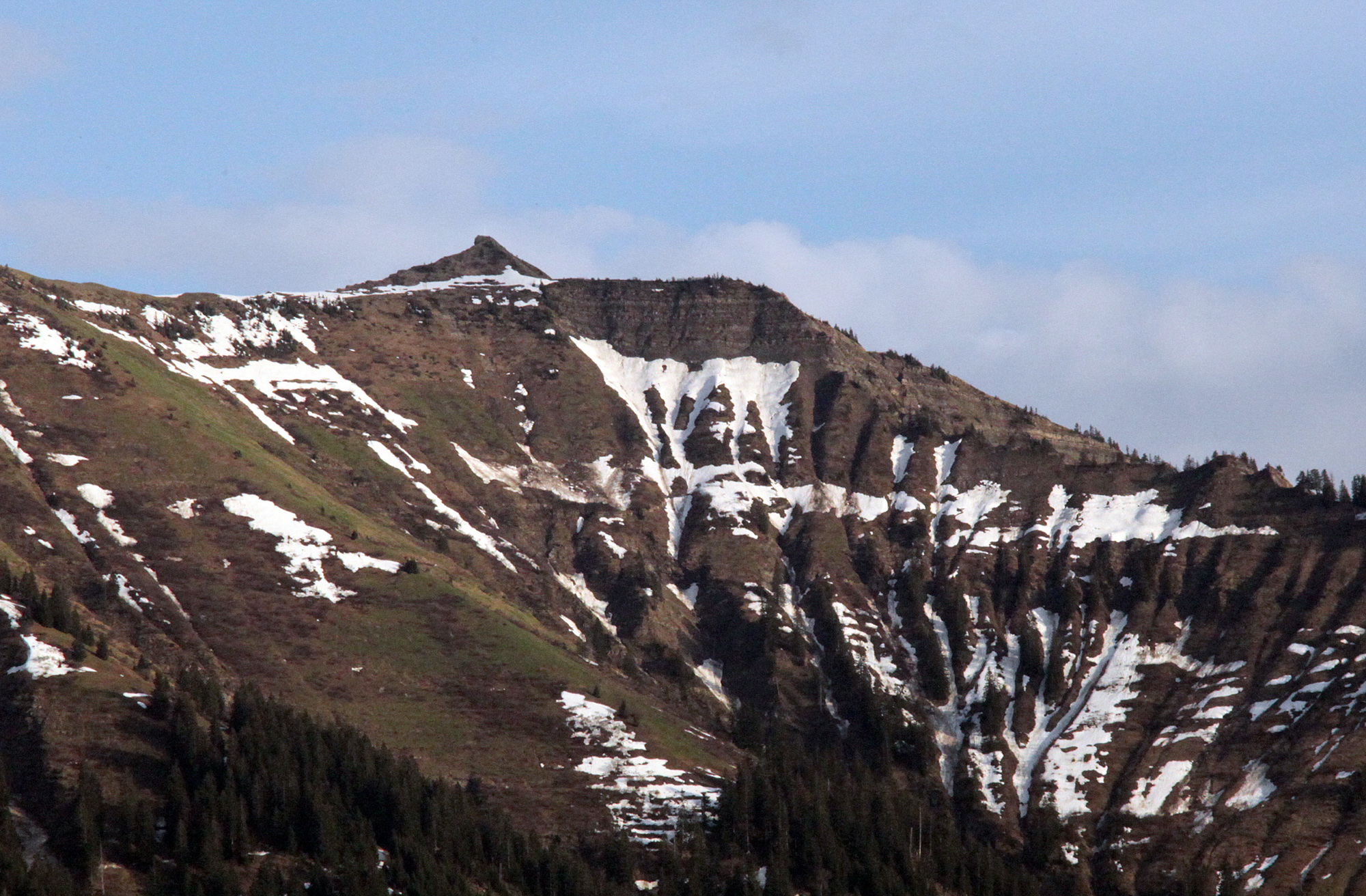 Das Firstkalb ist ein durch Ausaperung in den Rinnen und Mulden des Berges "First" in Dornbirn (Österreich) entstehenes Schneebild.